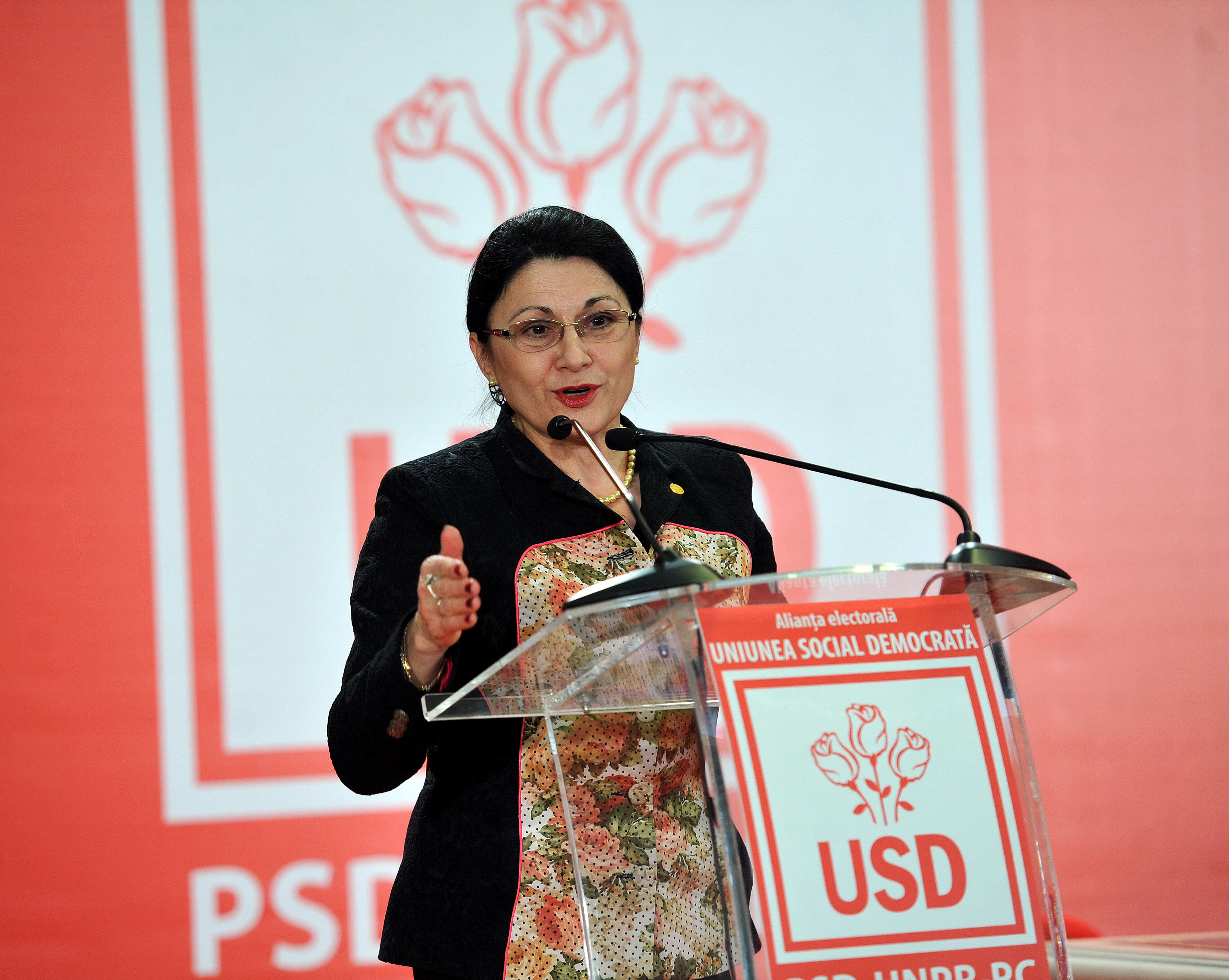 Ecaterina Andronescu la Victor Ponta la semnarea protocolului de infiintare a USD - 10.02.2014